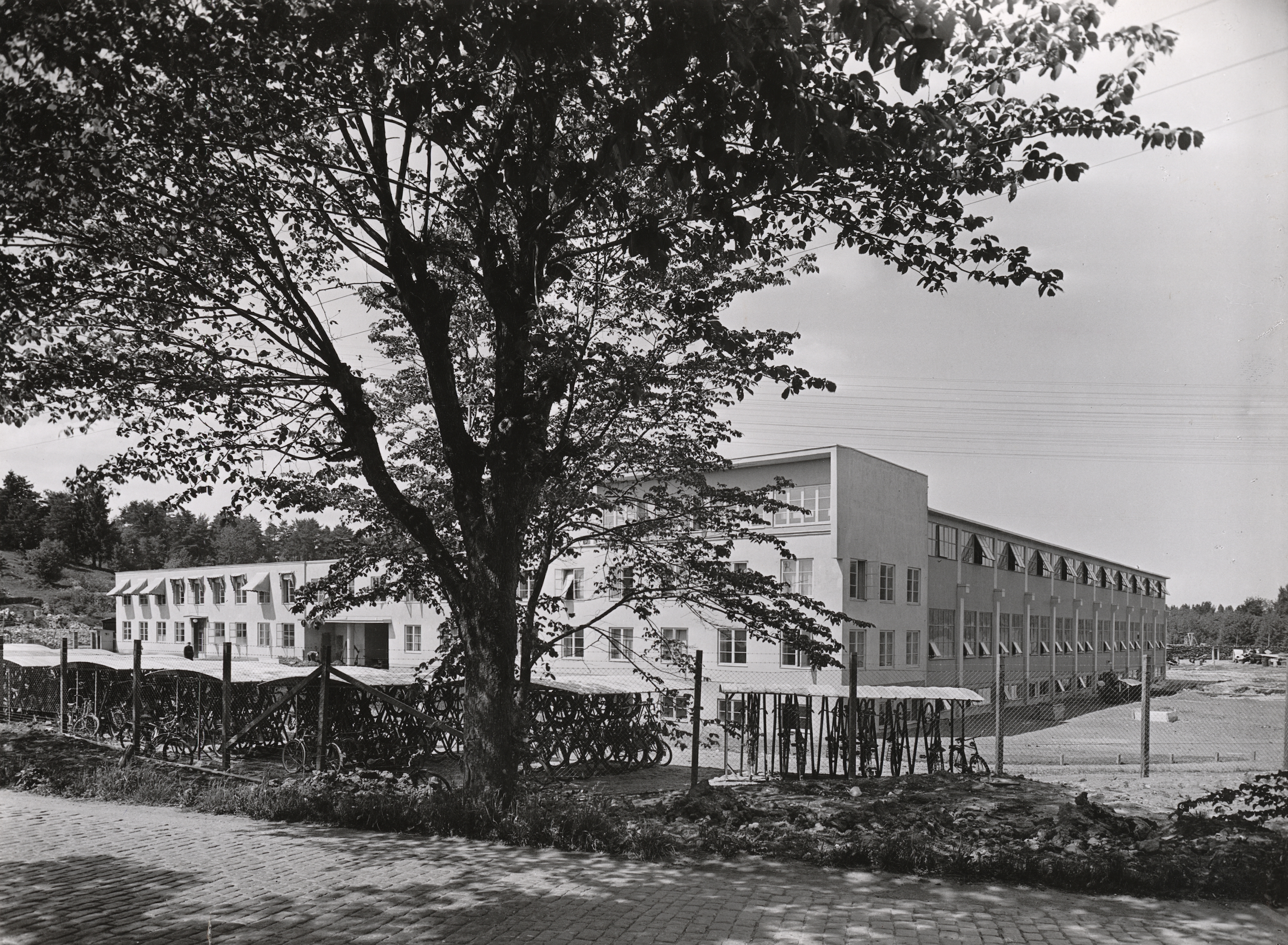 Fabriken Wedaverken AB W Dan Bergman sett från Bergaholmsvägen i Södertälje i Södermanland 1943